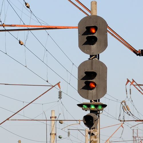 Входной светофор станции имени Тараса Шевченко (Одесская ЖД) с показанием «два жёлтых и зелёная светящаяся полоса»